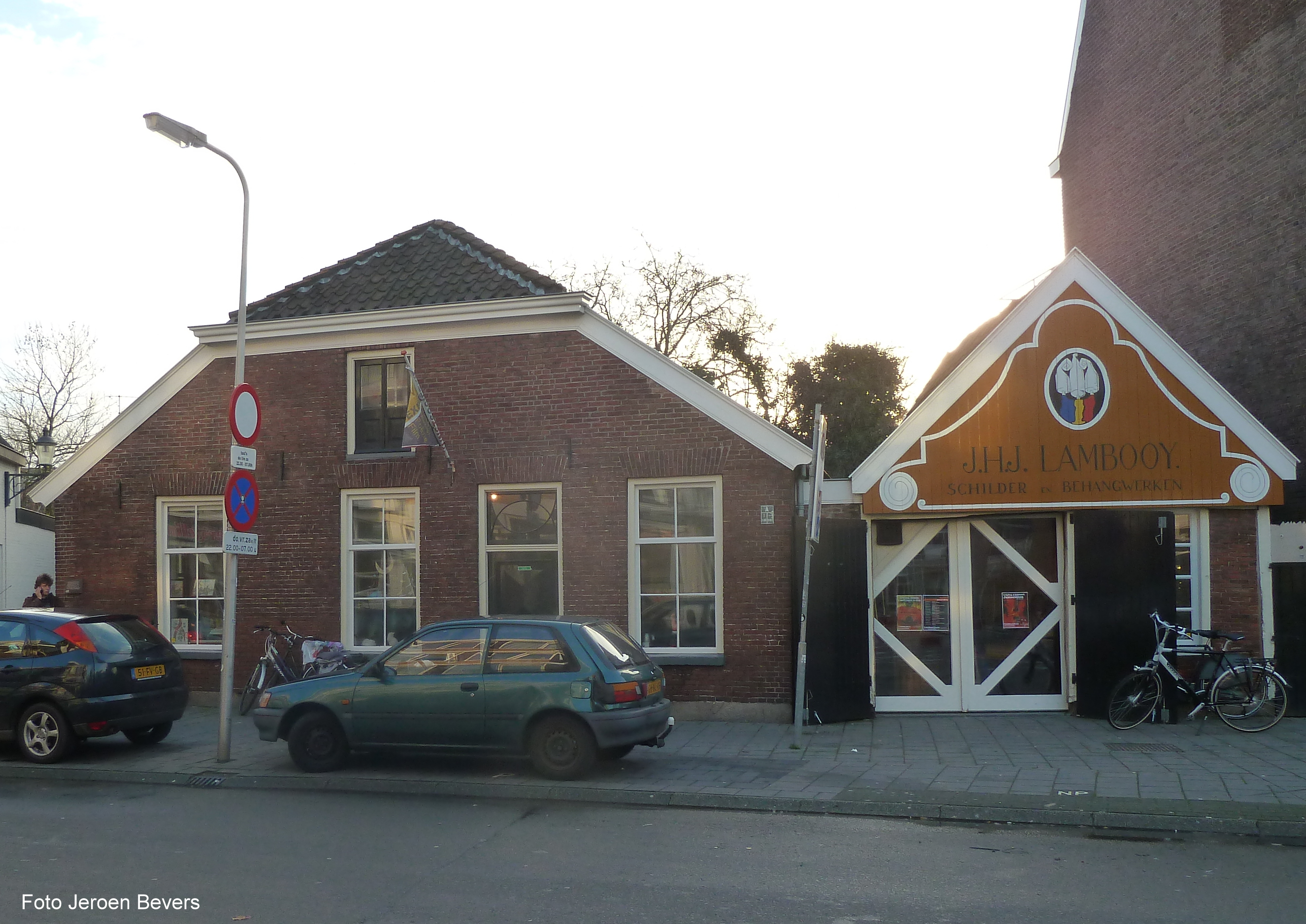 Foto het Lambooijhuis